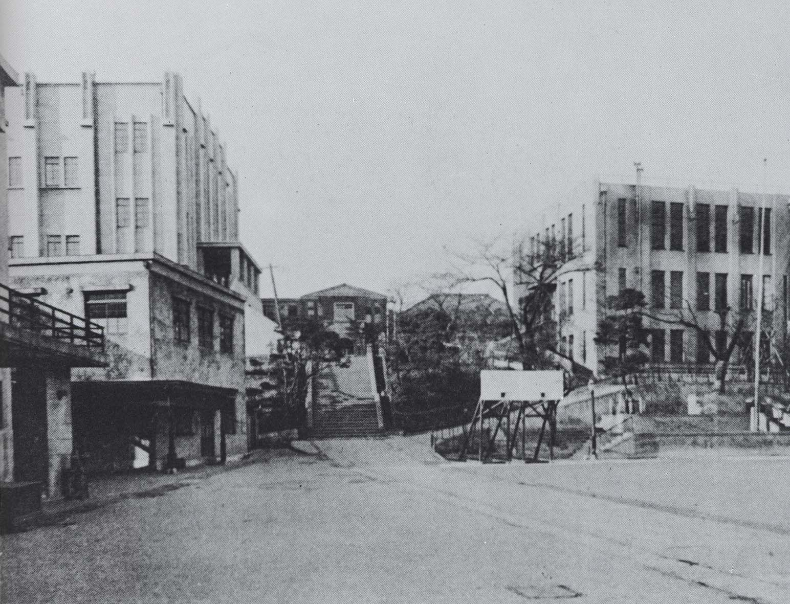 正門からの眺望